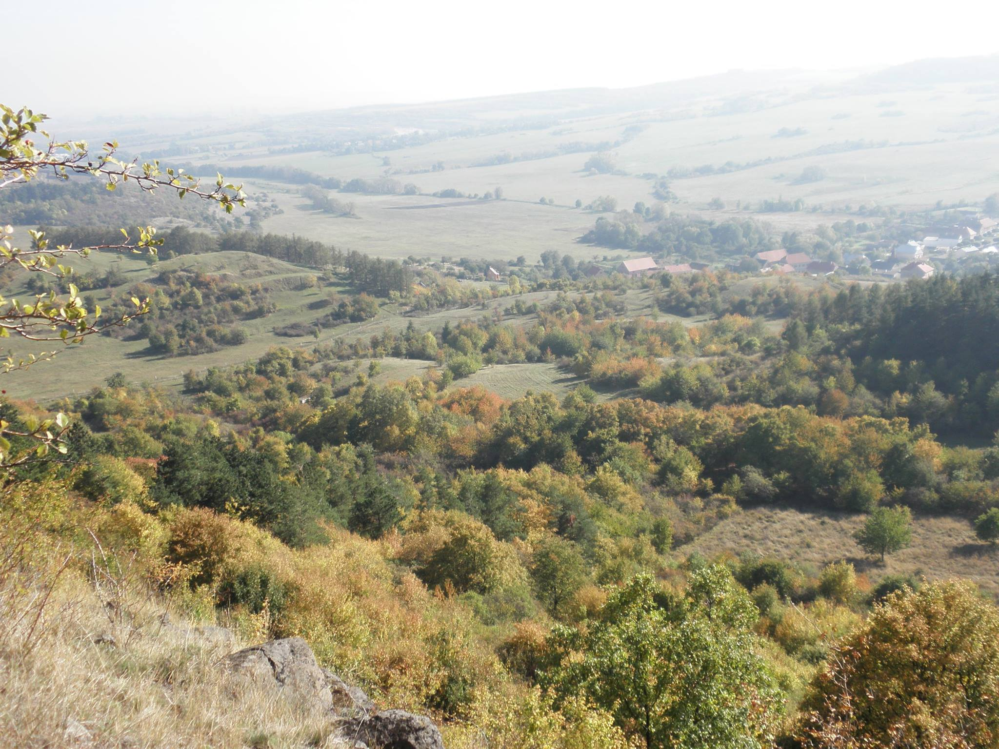 Na pravé straně lze vidět Kadaňskou Jeseň.